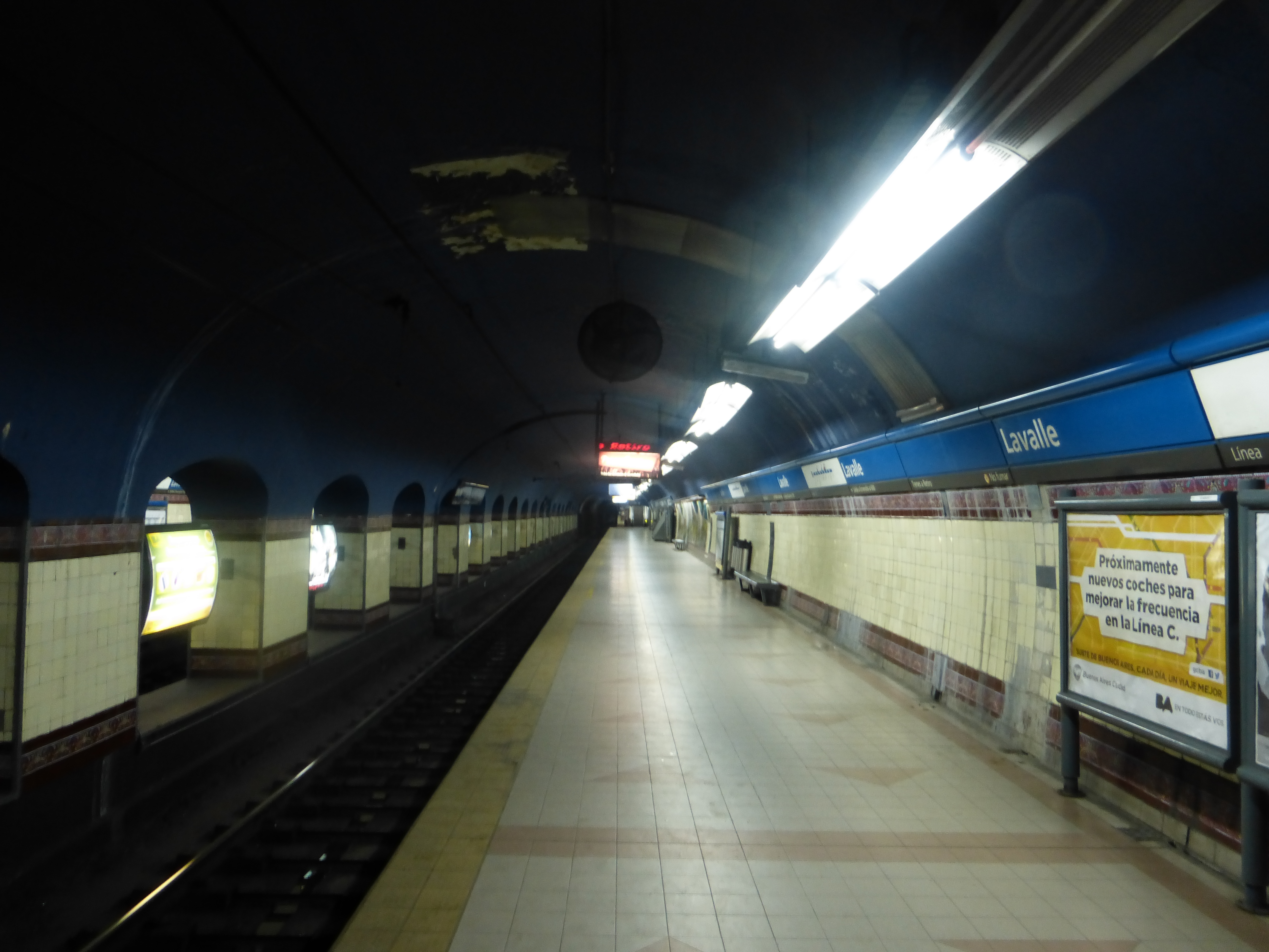 Vista del andén norte de la estación Lavalle, de la línea C del Subte de Buenos Aires.